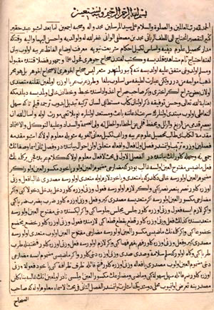 Vankulu Lügati -Lügat-ı Vankulu- Tercemetü's-Sihahi'l-Cevheri, 1729, Osmanlı devletinde matbaada basılan ilk eserdir.